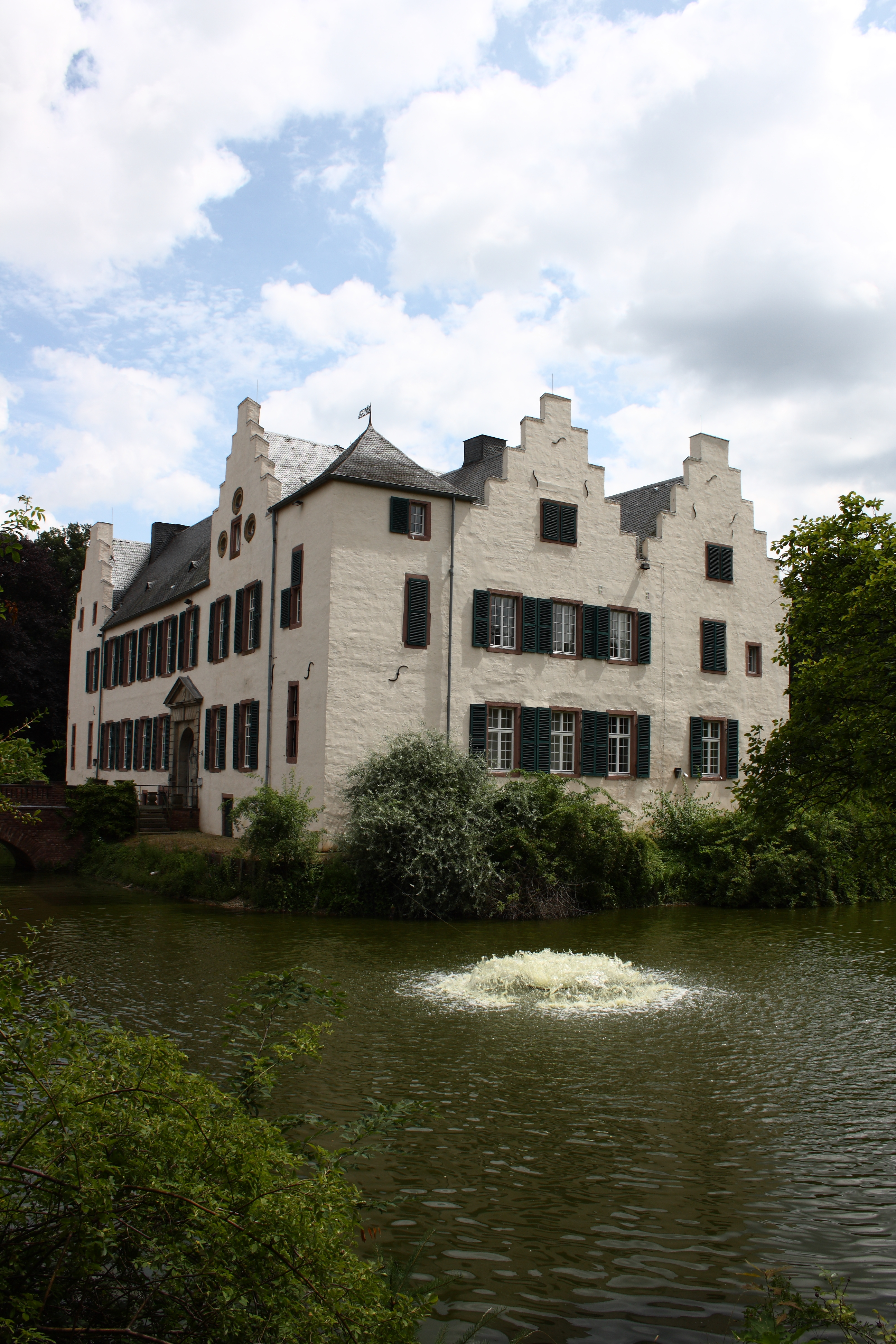 Burg Heimerzheim in Heimerzheim, einem Ortsteil von Swisttal im Rhein-Sieg-Kreis